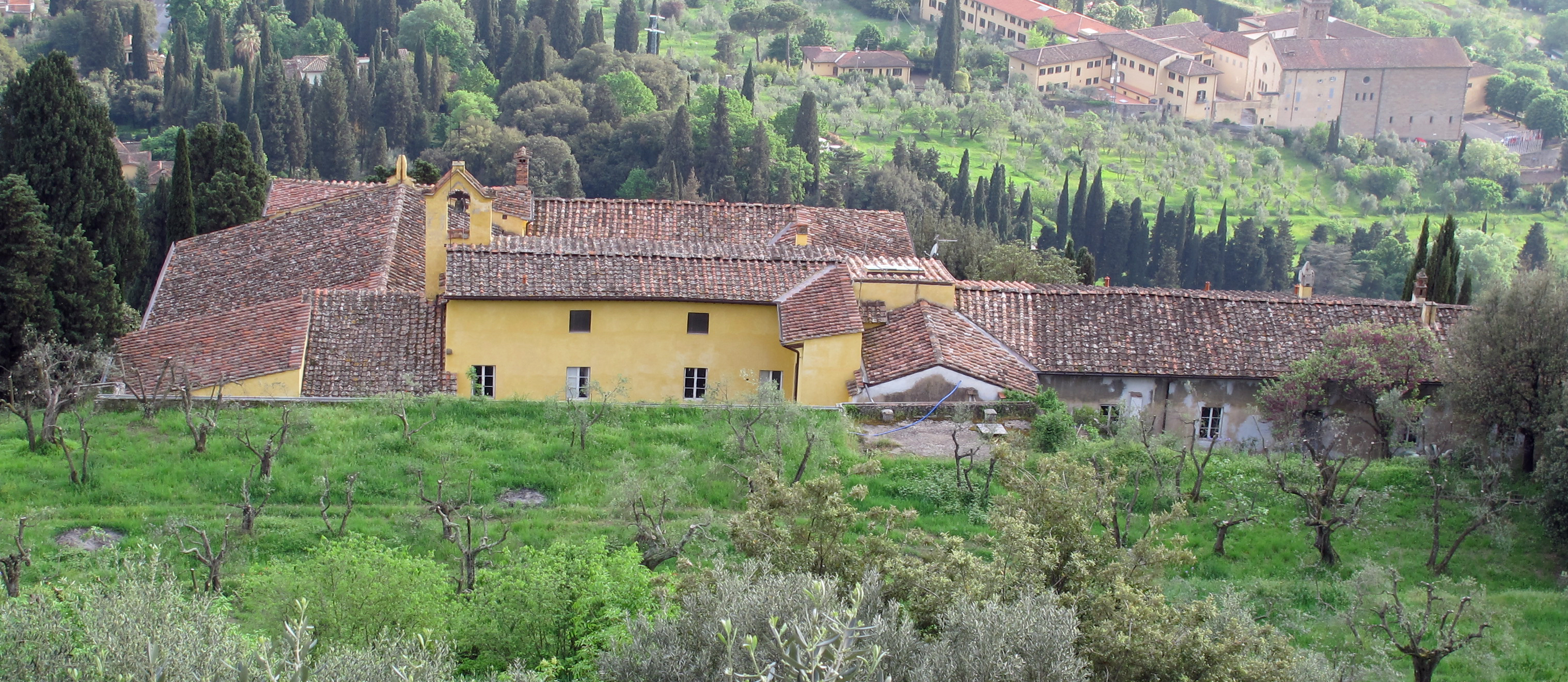 Fiesole, villa san girolamo vista da san francesco